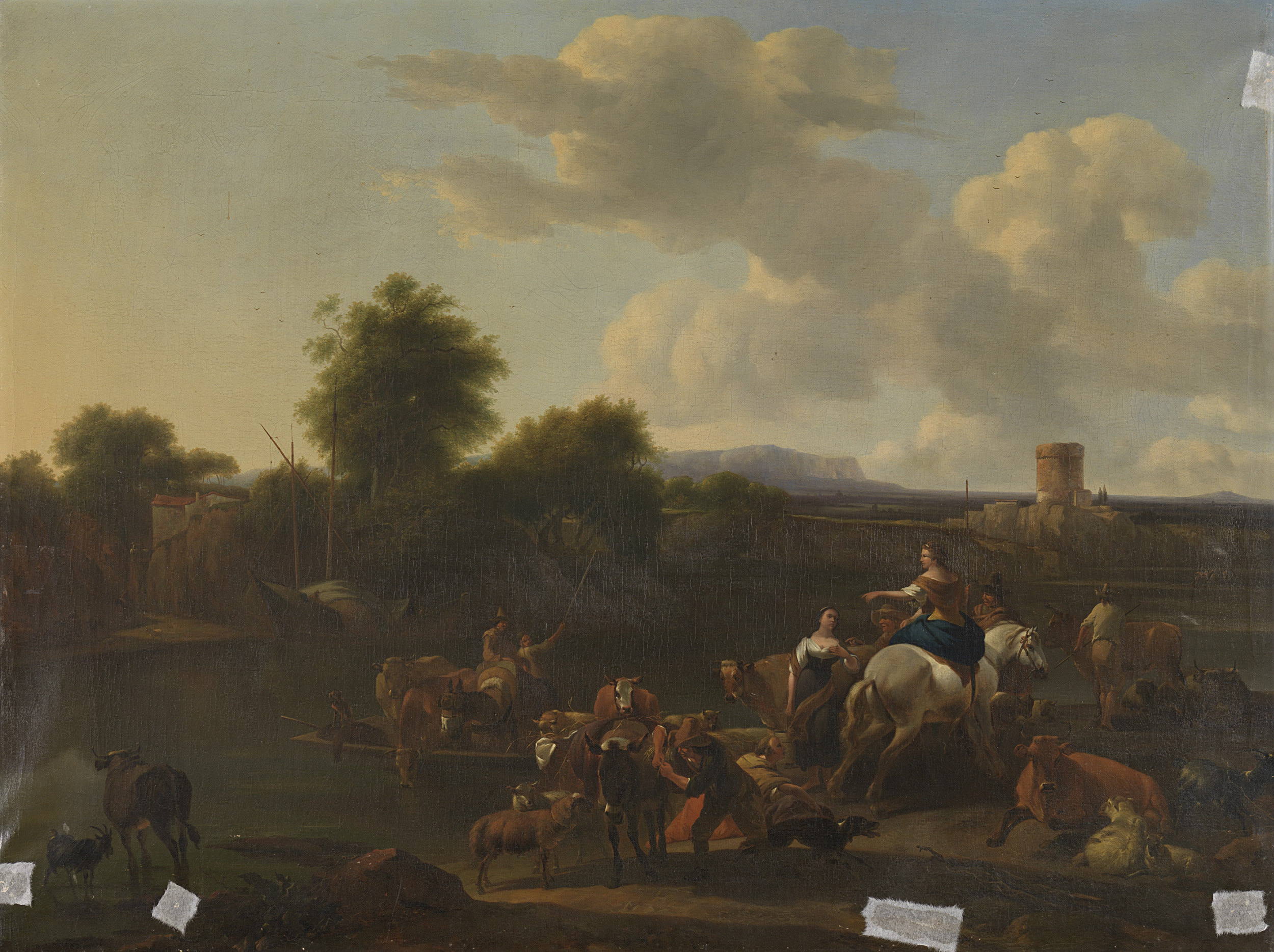 Het ponteveer. Kopie naar het schilderij van Berchem, SK-A-31. Op de voorgrond wachters herders met hun kuddes koeien en schapen en een vrouw op een paard op de pont om de rivier mee over te steken.